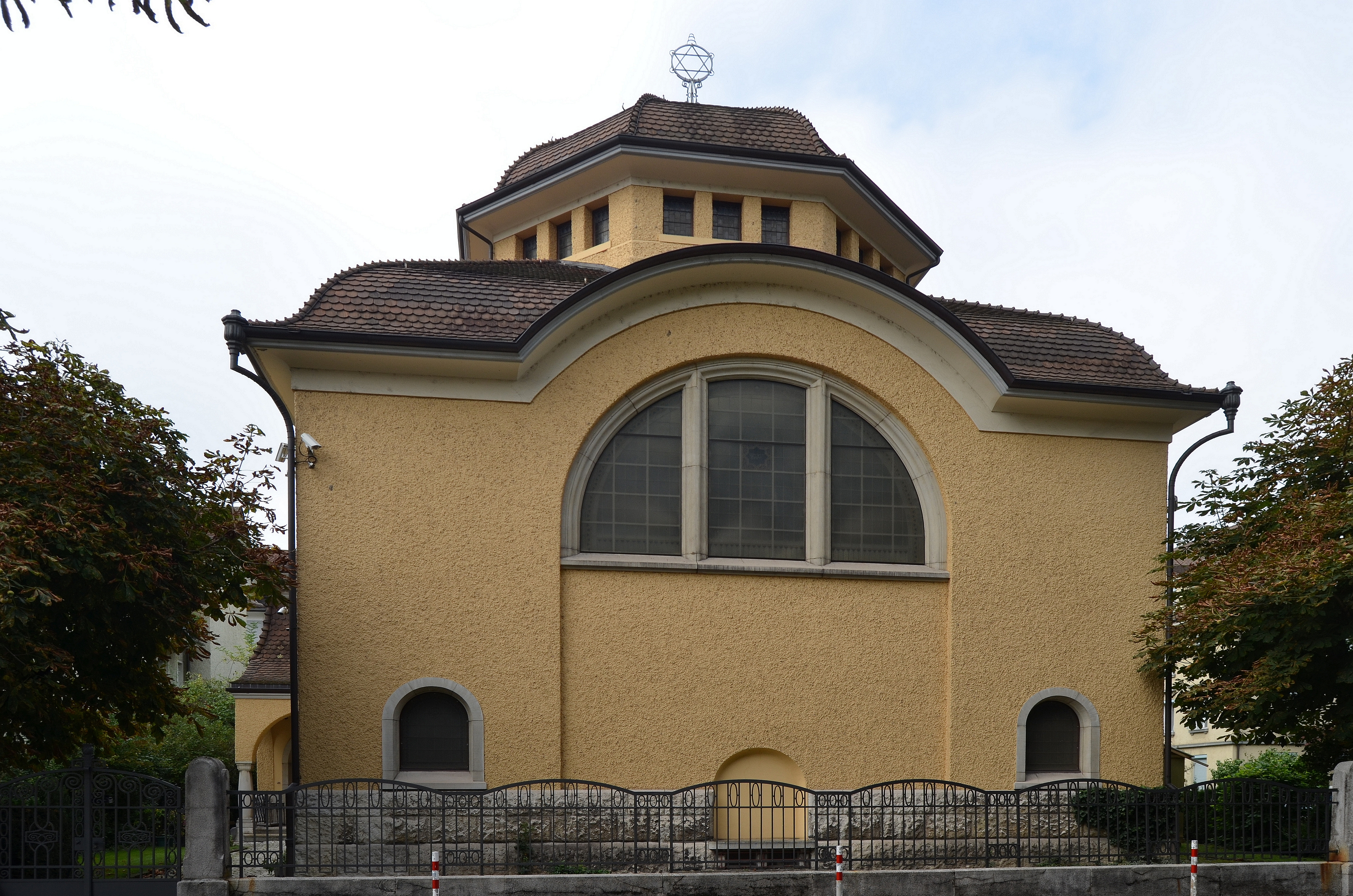 Synagoge. KGS_Nr = 11609. 17 Parkstrasse, Baden (AG). 665.594 / 259.024. Kategorie: A. Objektart: Sakralbauten. Bauten anderer Glaubensrichtungen. Synagoge